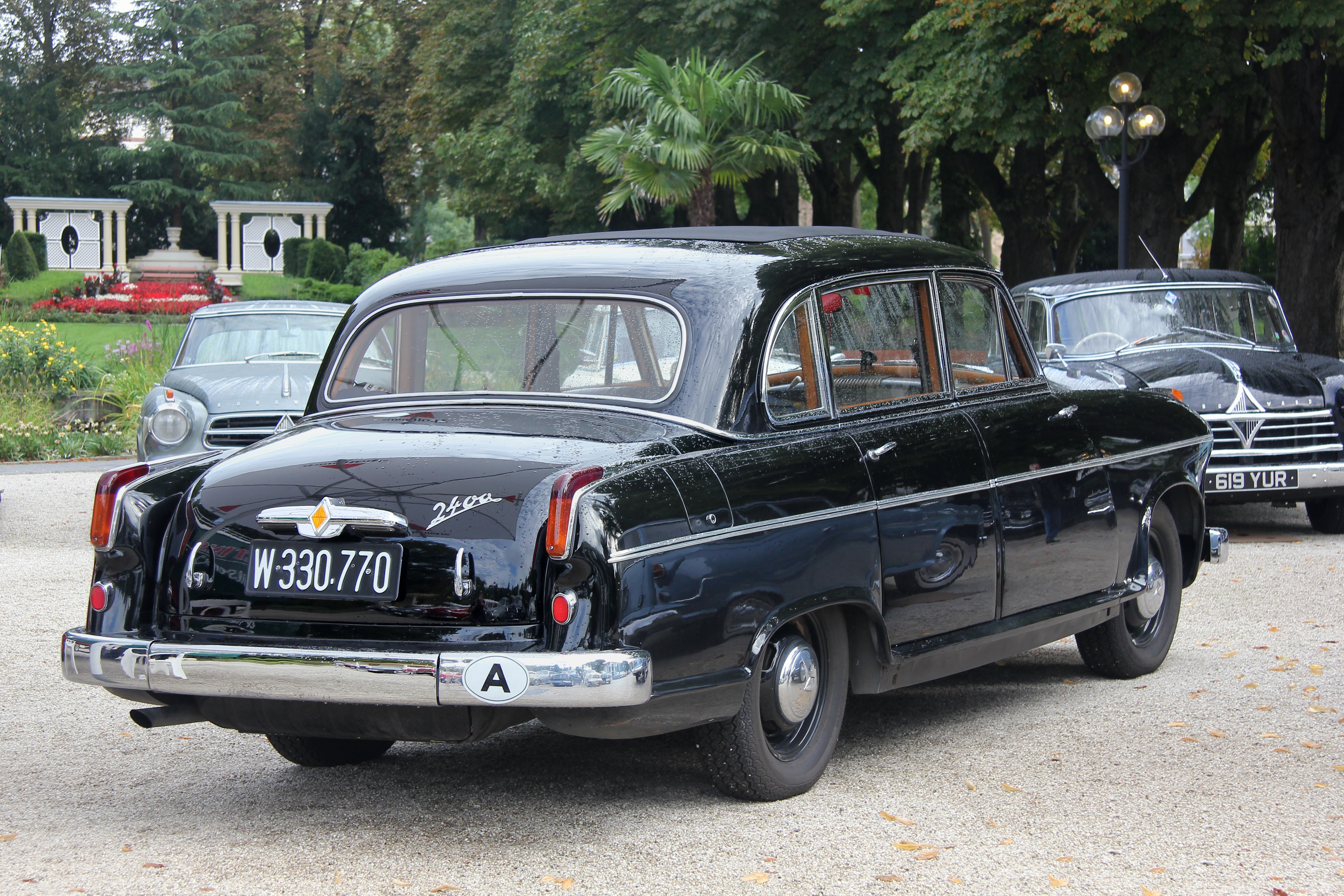 Borgward Hansa 2400 II, 345 Stück gebaut von 1955 bis 1958 (Kennzeichen des Fahrzeugs verändert)